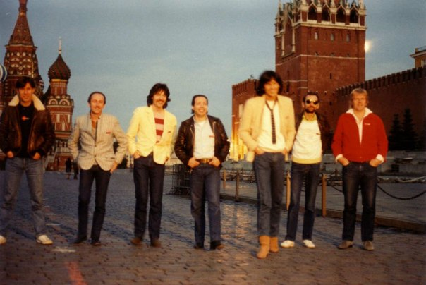 Le groupe Paris France Transit sur la Place Rouge juin 1983